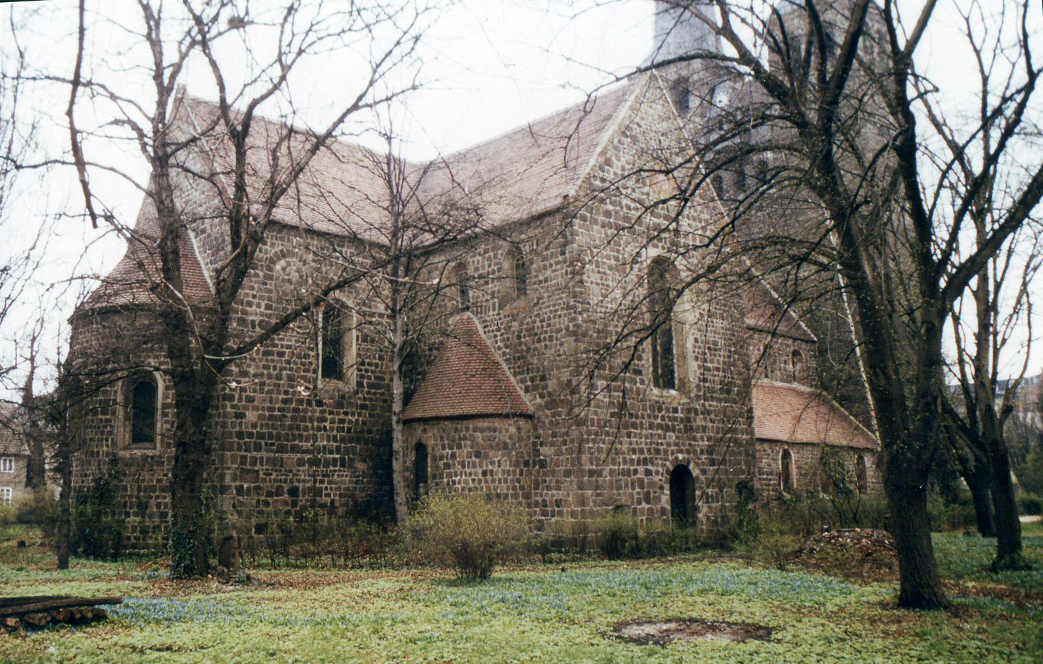 Pfarrkirche St. Nikolai ("Unterkirche") in Burg bei Magdeburg